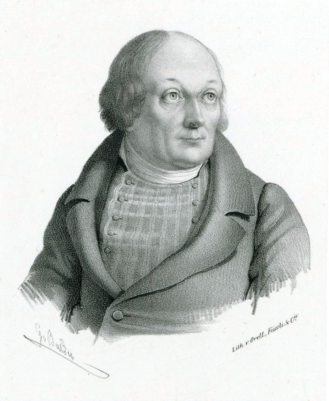 Depicted person: Hans Georg Nägeli